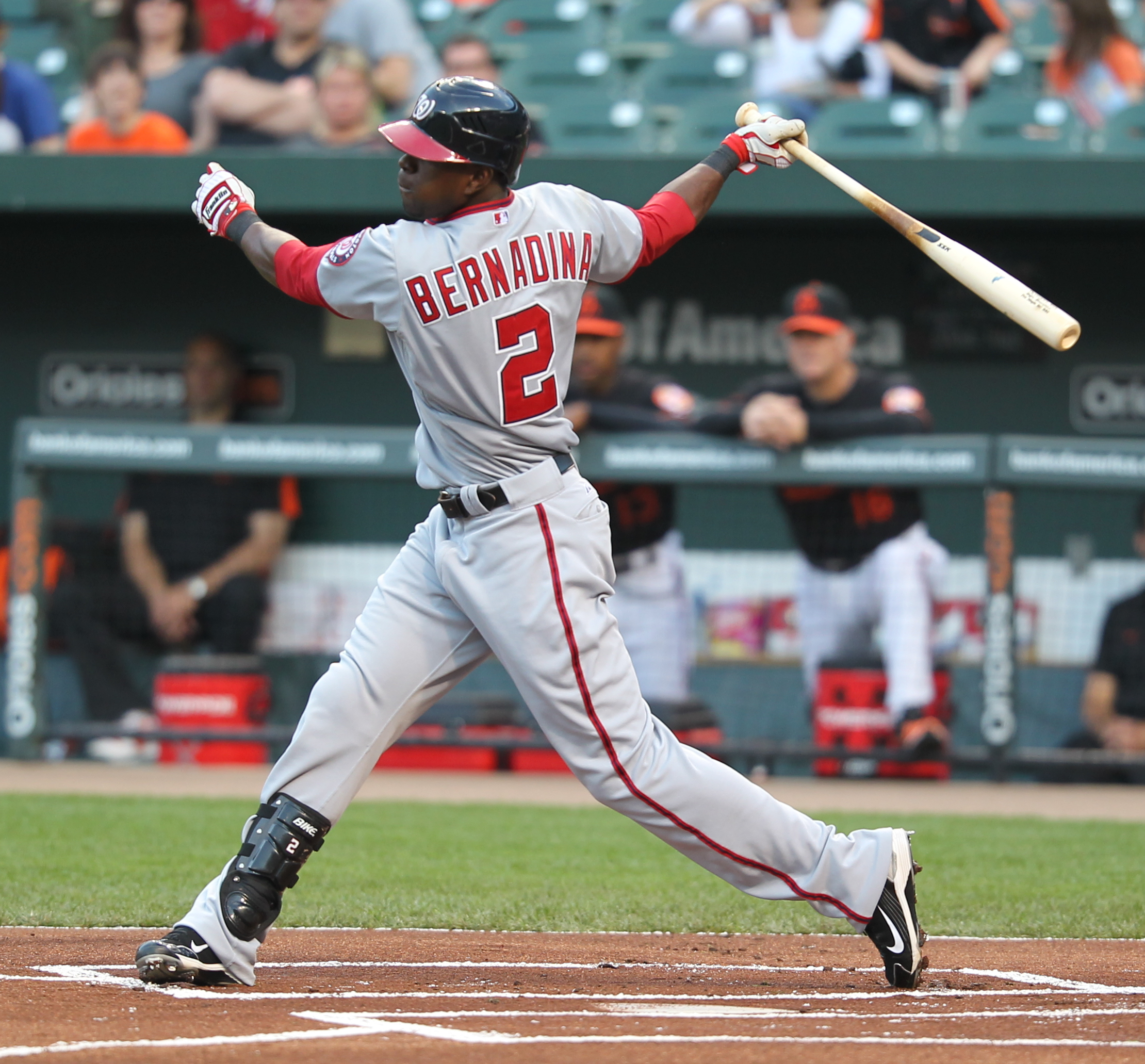 Roger Bernadina